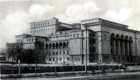 1941. Оперный театр. Октябрь